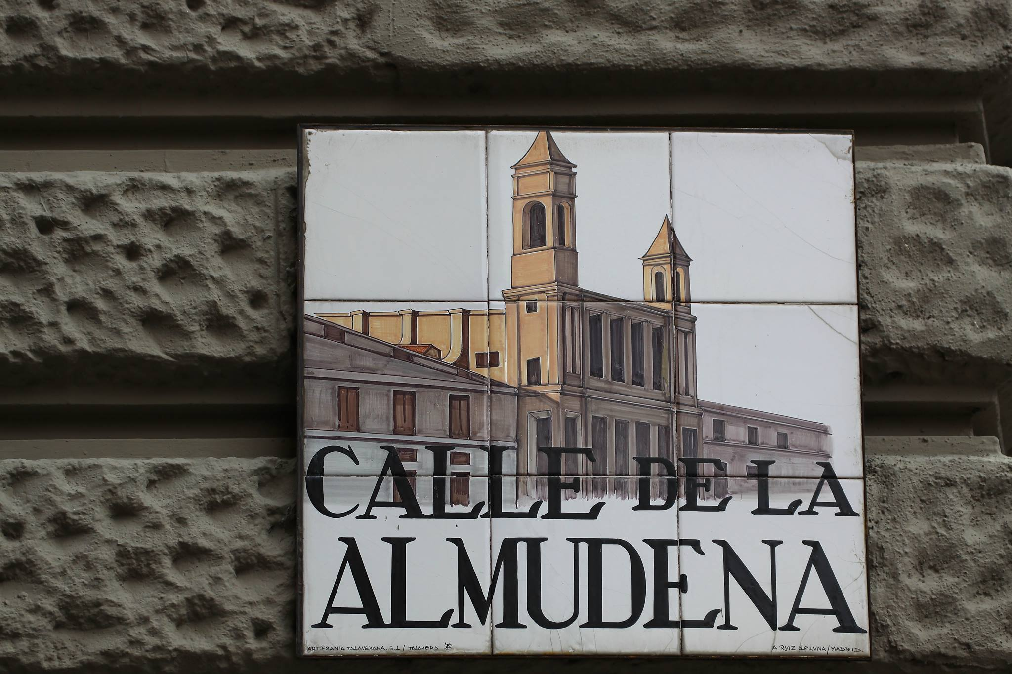 Rótulo de azulejo